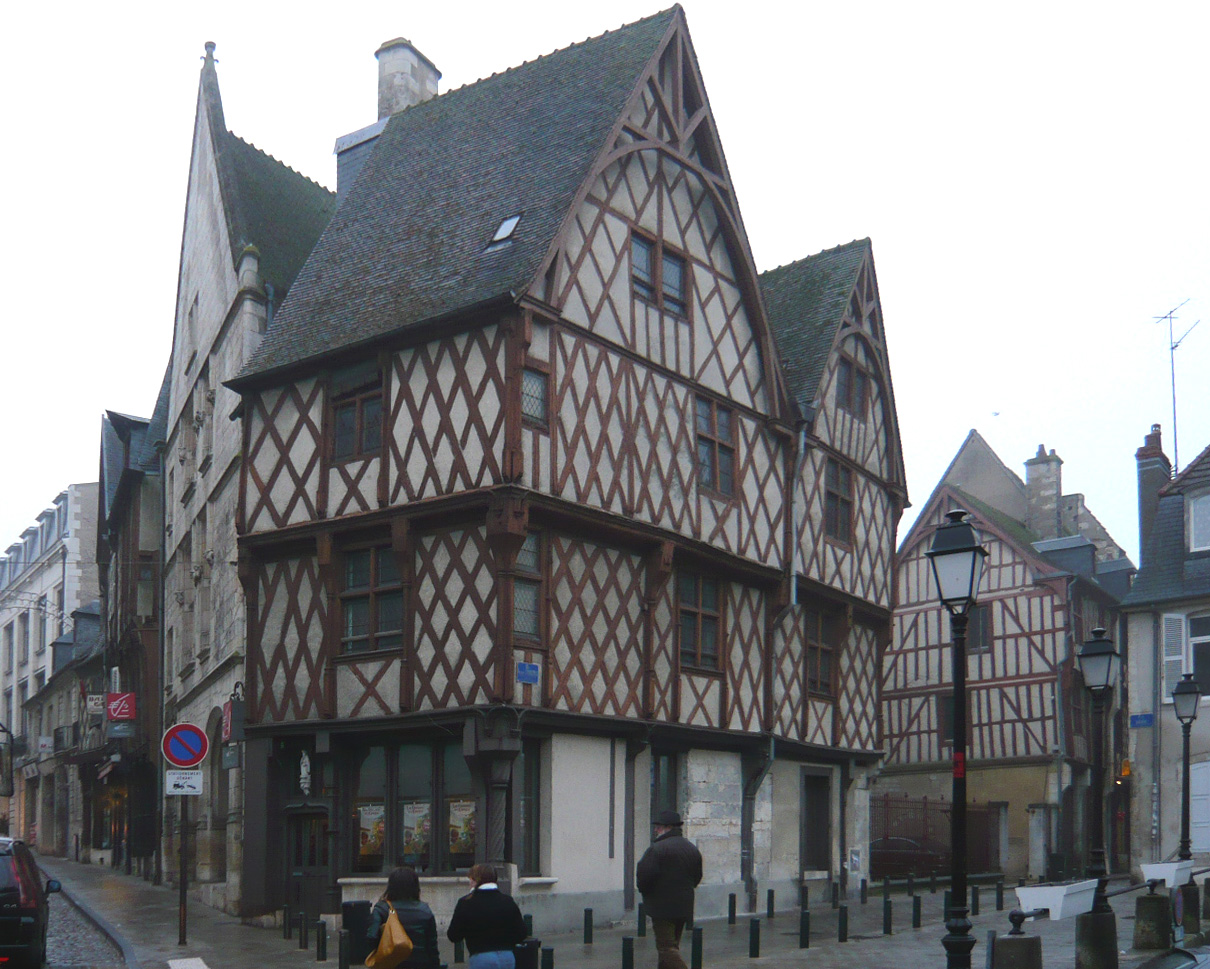 Maisons à Bourges, France